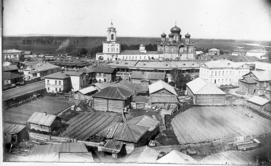 Центральная часть города в 19 веке